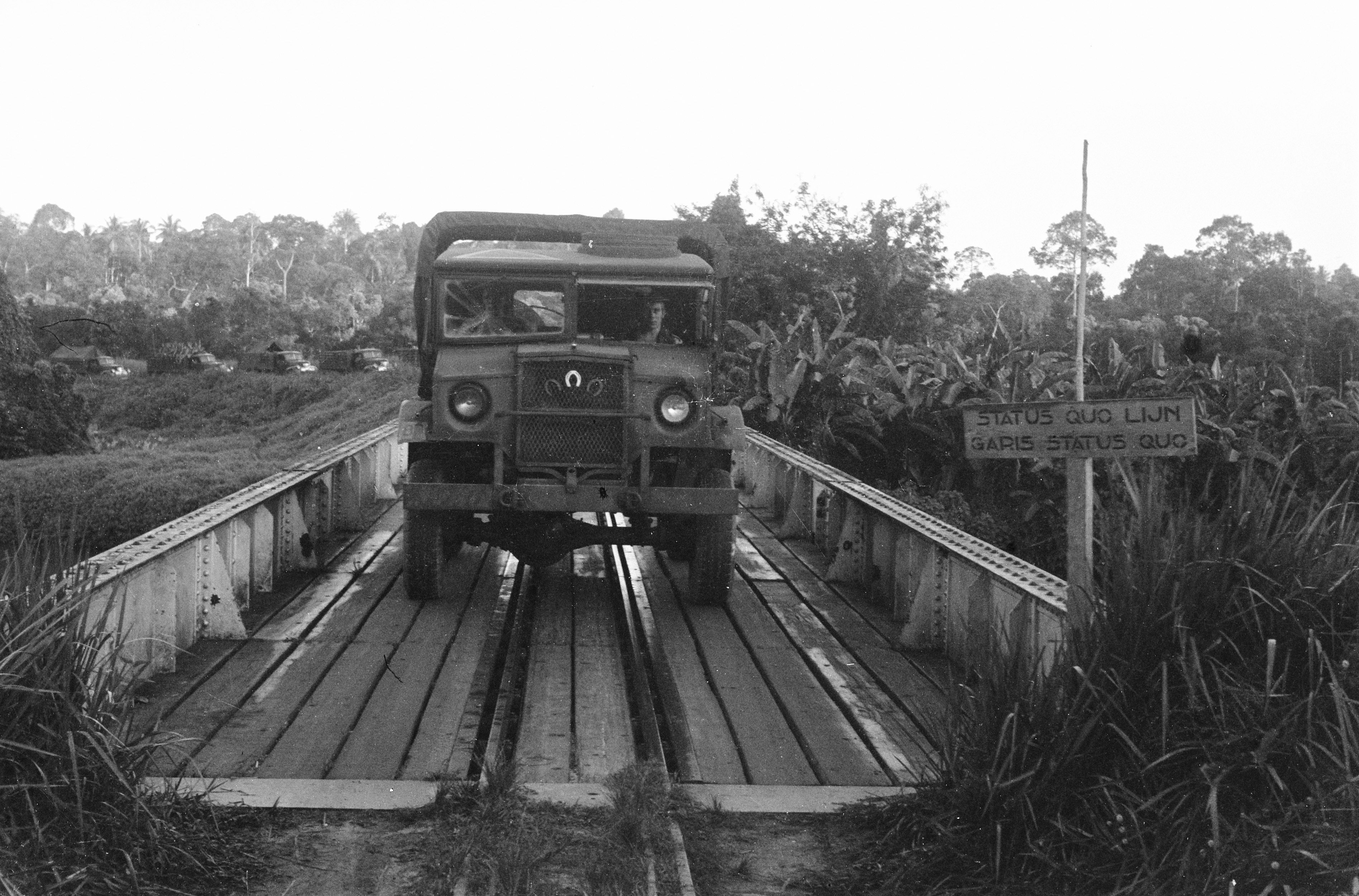 Collectie / Archief : Fotocollectie Dienst voor Legercontacten Indonesië Reportage / Serie : [DLC] Actie bij Rantau Prapat Beschrijving : Een Nederlandse colonne vrachtwagens passeert een brug en de Status Quo lijn Datum : 19 december 1948 Locatie : Indonesië, Nederlands-Indië, Sumatra Fotograaf : Fotograaf Onbekend / DLC Auteursrechthebbende : Nationaal Archief Materiaalsoort : Negatief (zwart/wit) Nummer archiefinventaris : bekijk toegang 2.24.04.02 Bestanddeelnummer : 5675